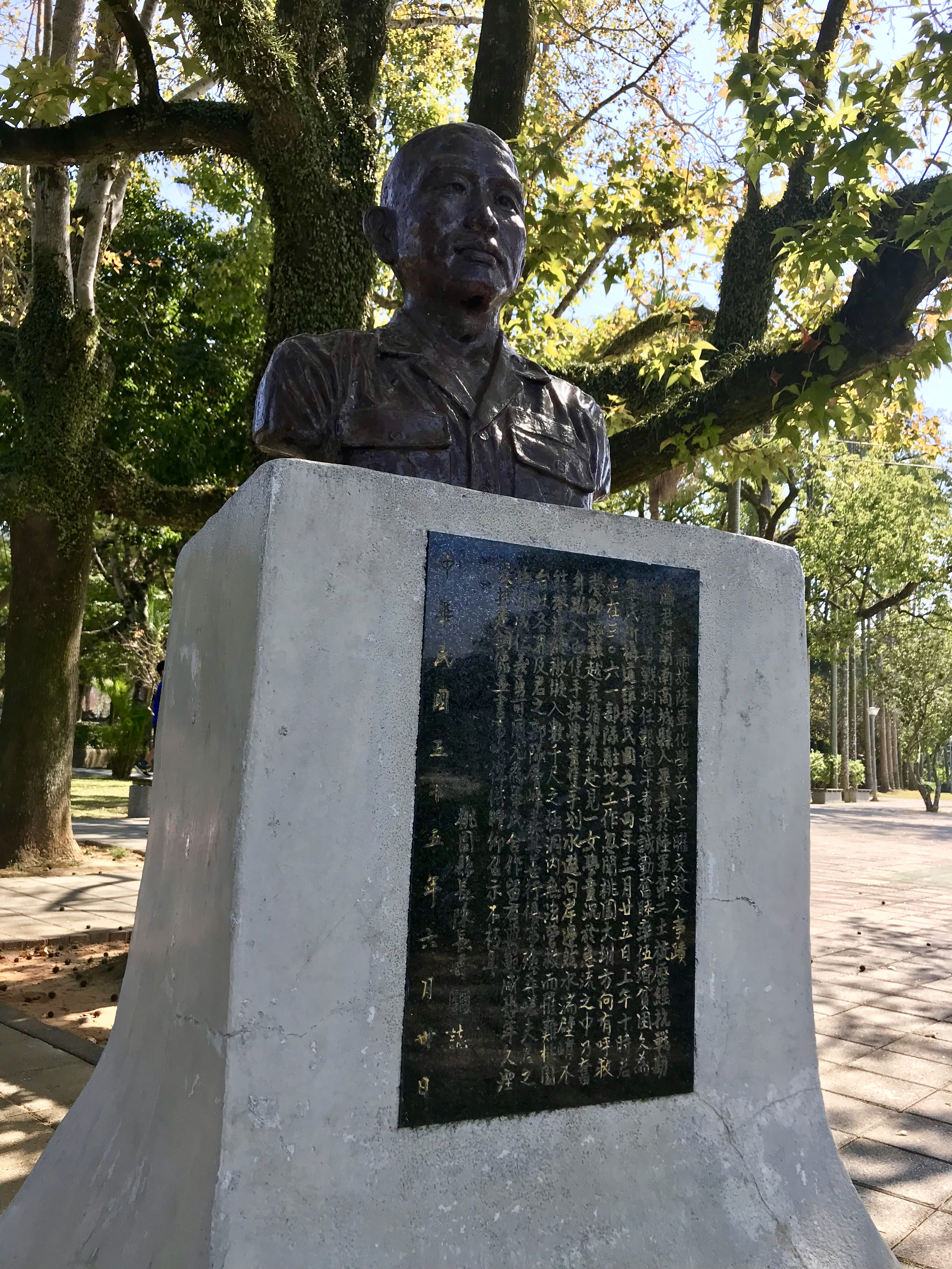 蕭曜友銅像